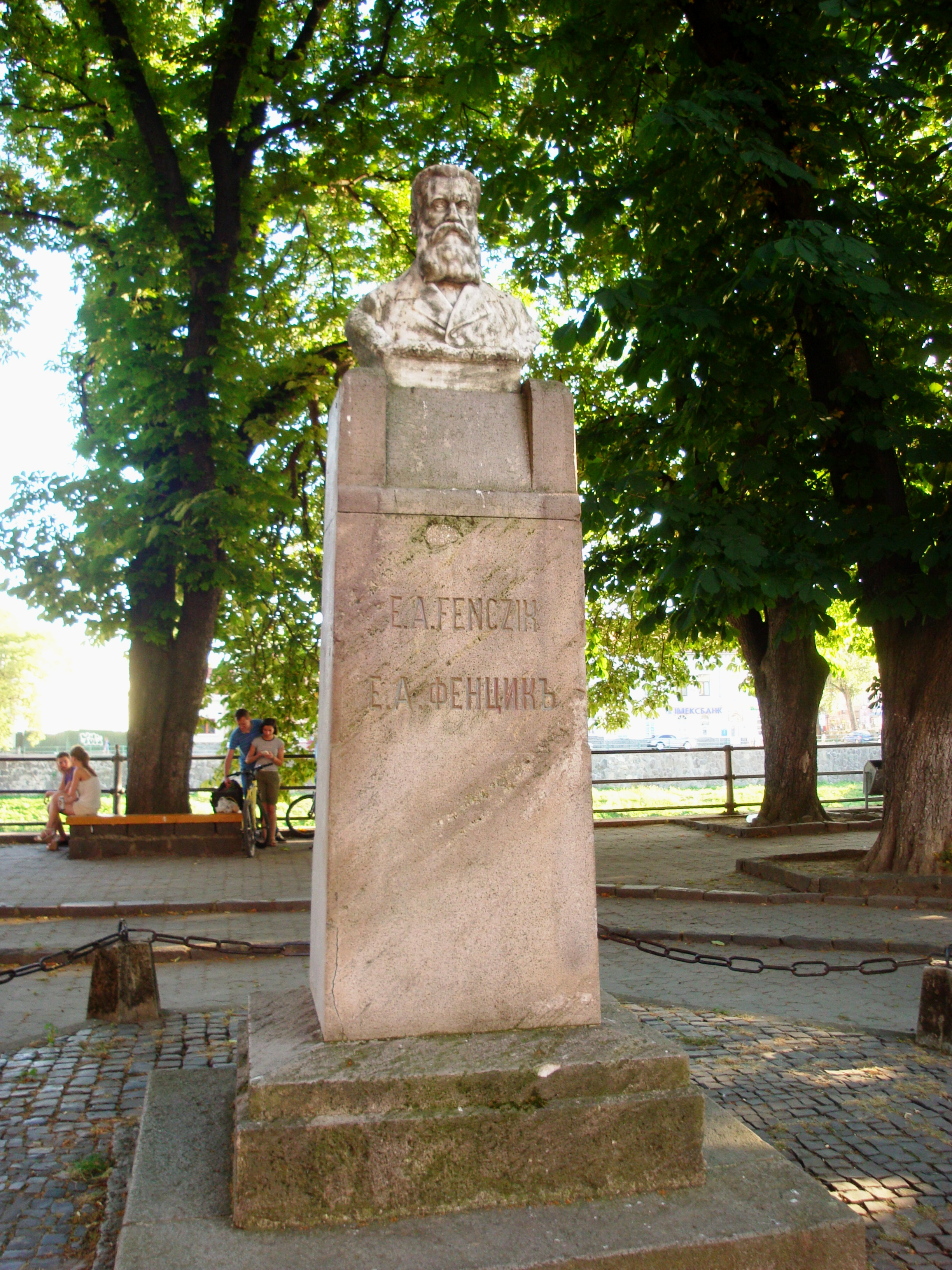 Пам'ятник Е.Фенцику — Закарпатському письменнику І просвіти, Ужгород, пл. Фенцика